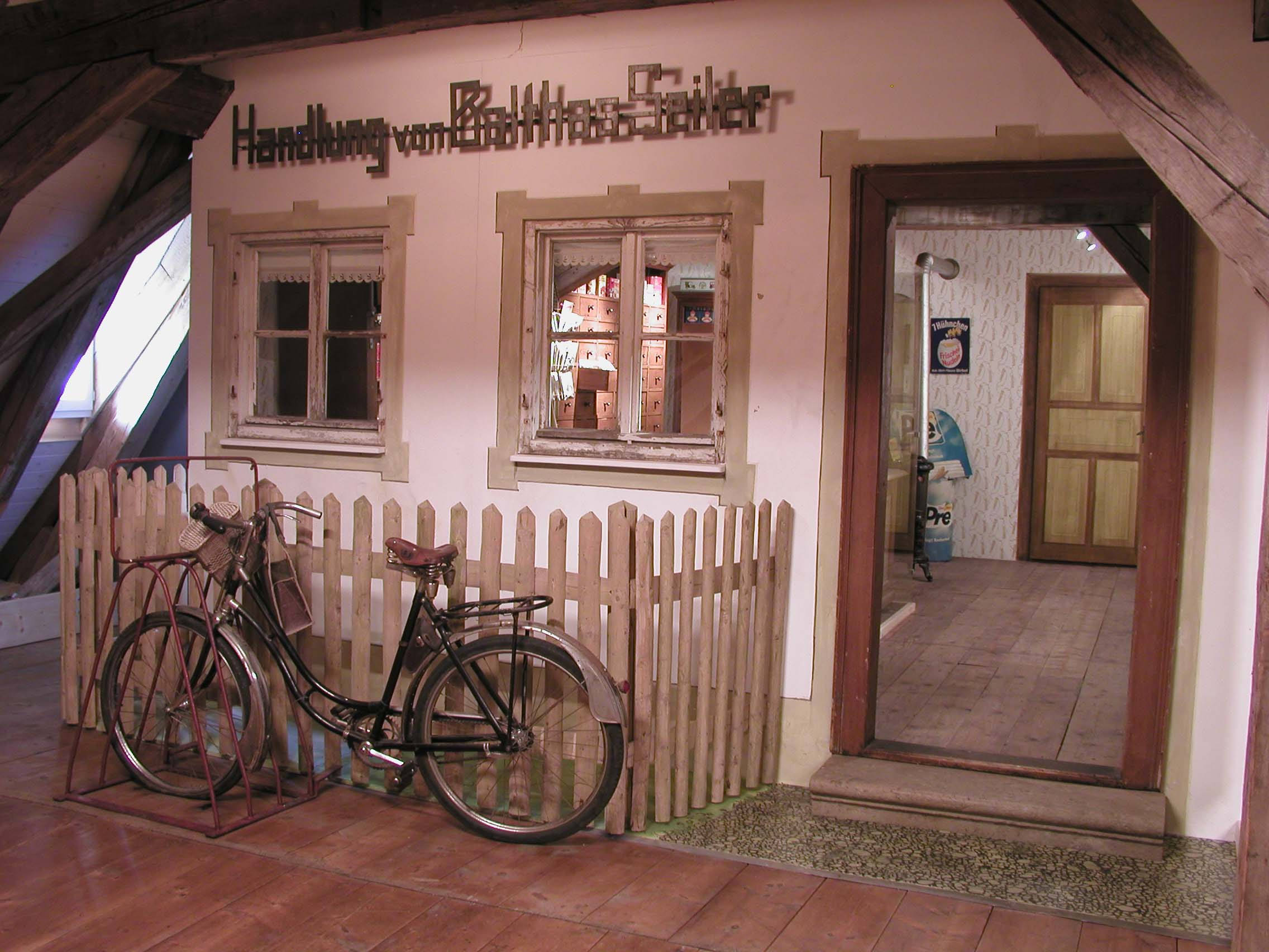 Milchladen Museum Maihingen